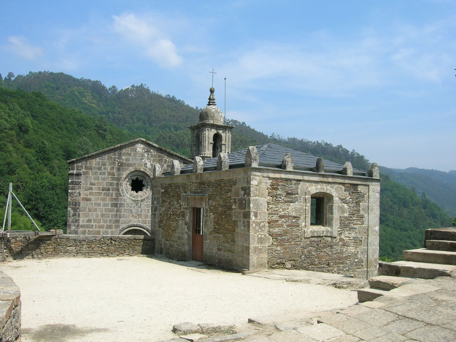 Mosteiro de San Xoán de Caaveiro (Parroquia:Capela (Santiago), concello da Capela, Comarca do Eume, Galicia - Spain'Monasterio de San Xoán de Caaveiro'